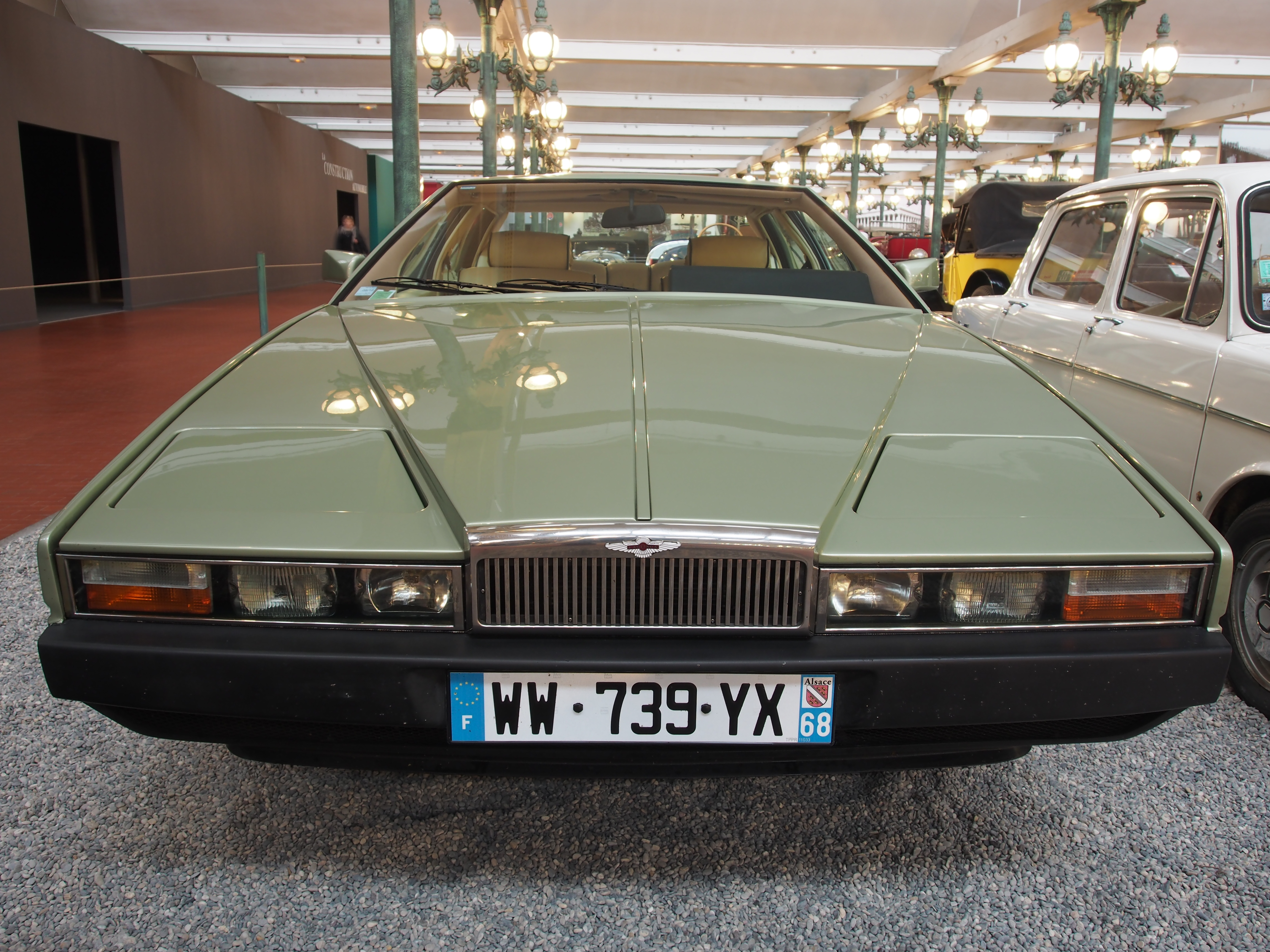 Photographed at the Cité de l’Automobile, Musée national de l’automobile, Collection Schlumpf, Mulhouse, France.